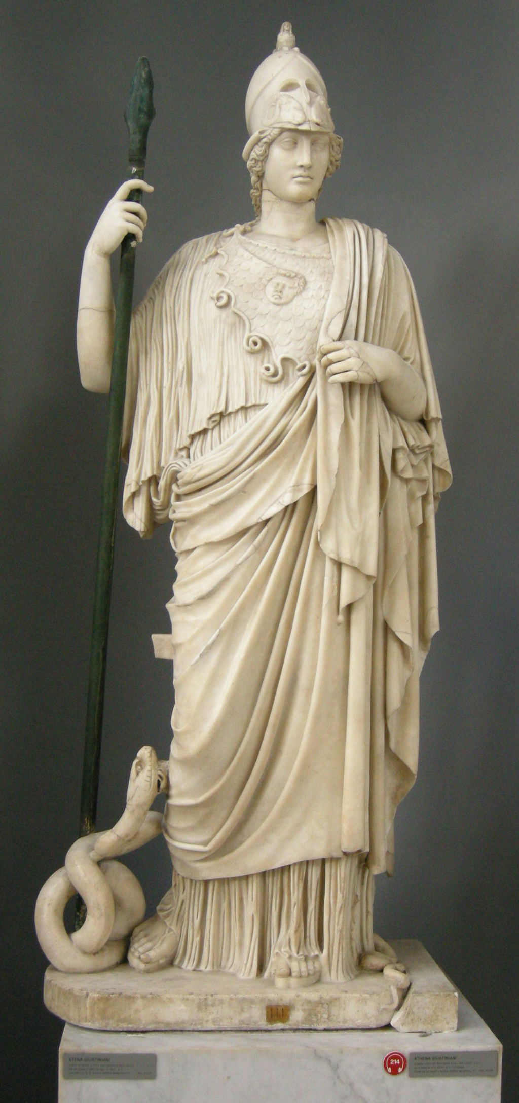 Atena giustiniani, copia romana da originale greco